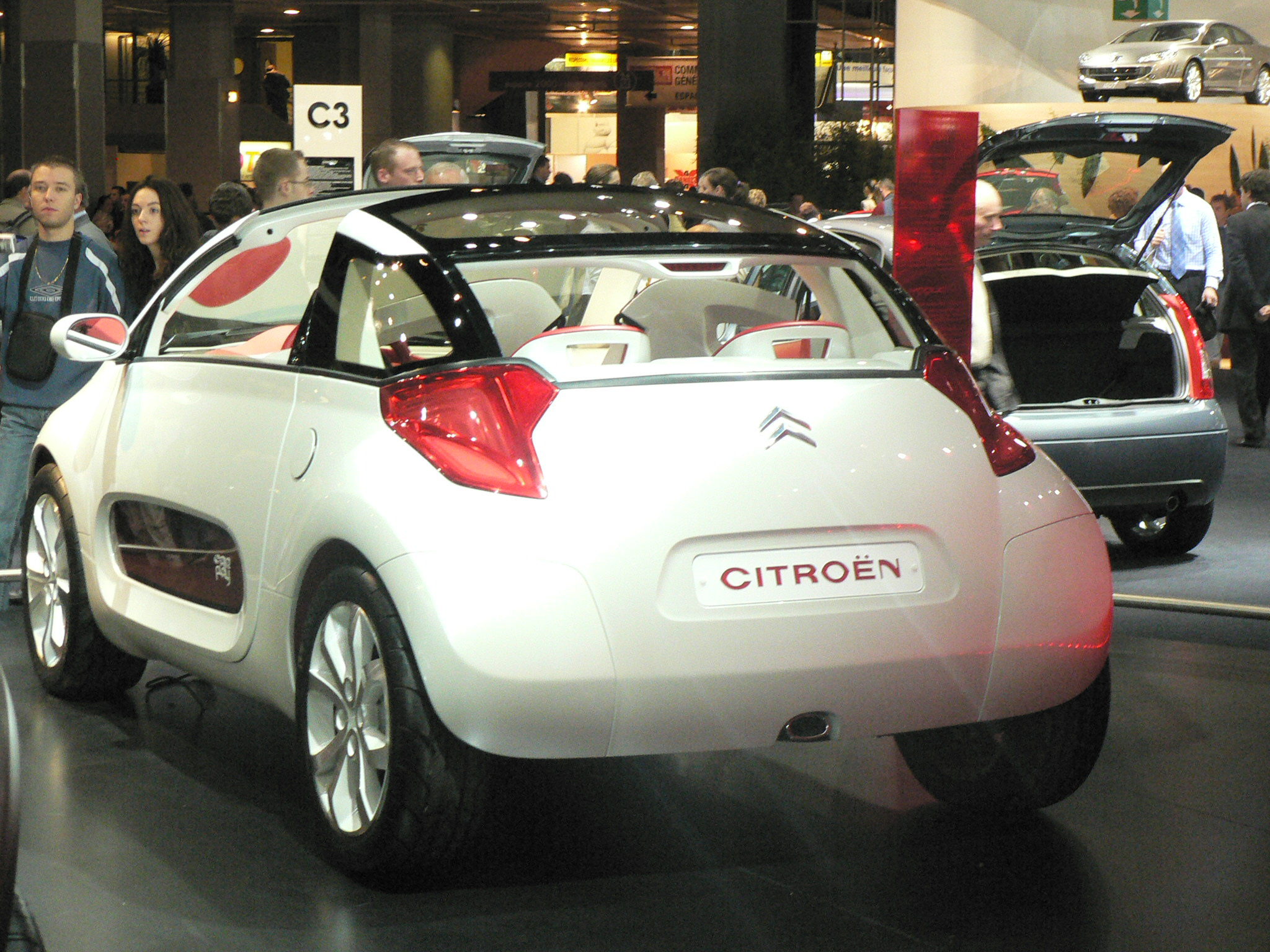 Mondial de l'automobile, Paris 2006